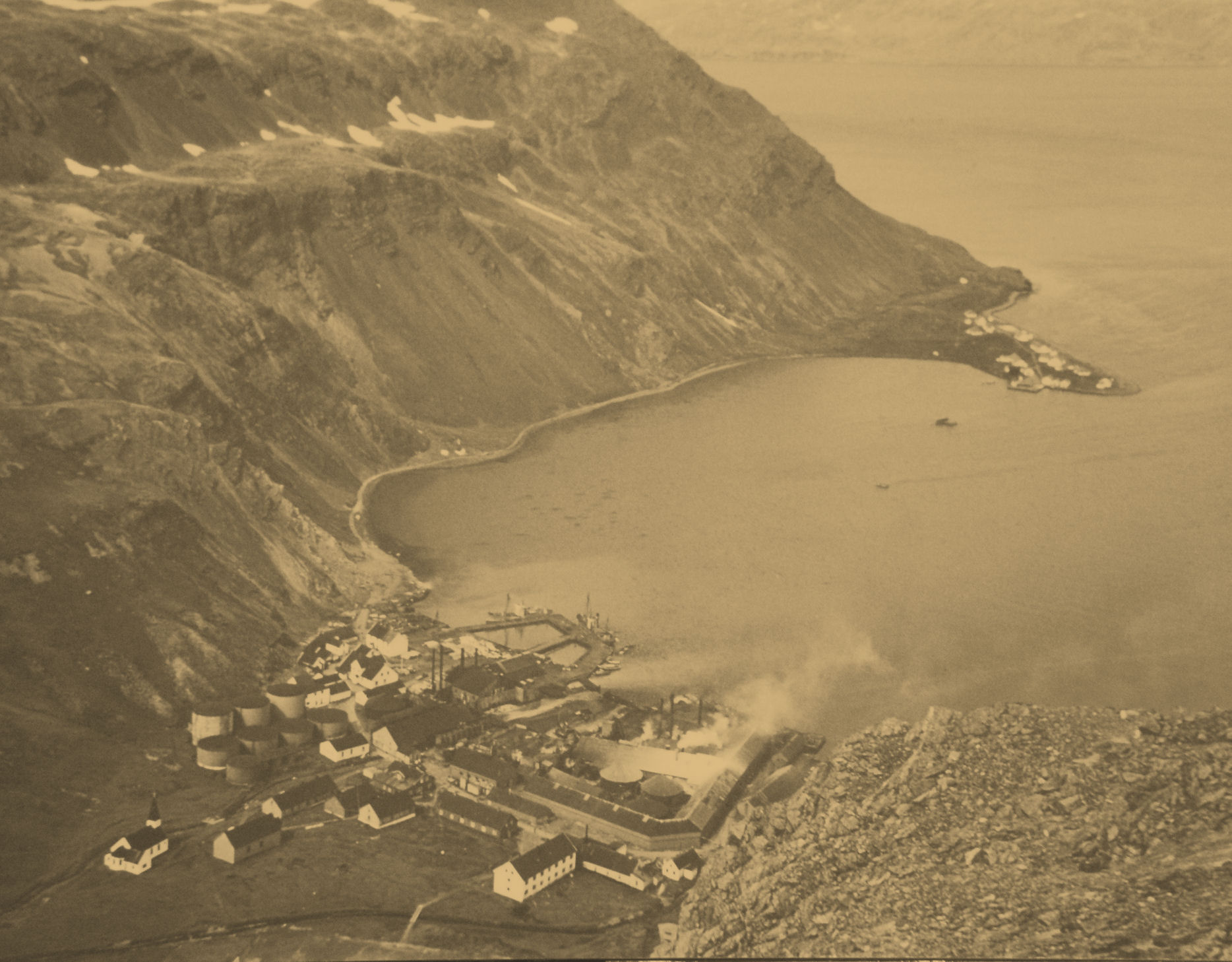 Grytviken - Musée - Photo de la station, de la baie et de la point King Edward